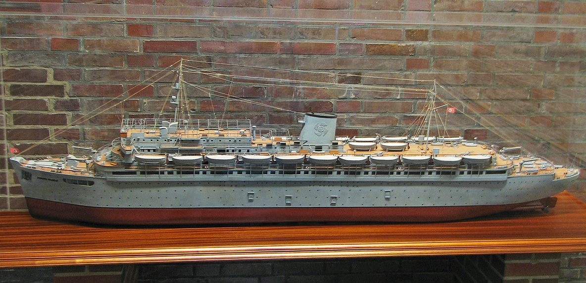 Dieses Bild zeigt ein Modell des Passagierschiffs „Wilhelm Gustloff“, ausgestellt im Marineehrenmal Laboe.